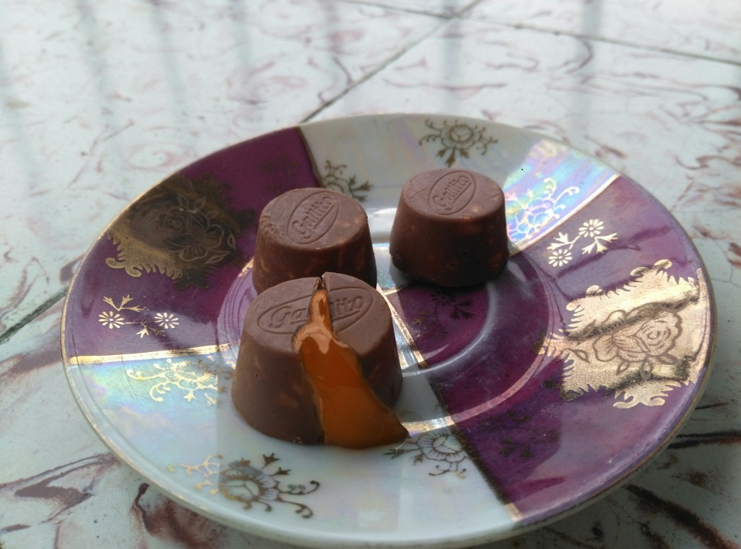 Versión jpg del archivo Archivo:Tapitas Costa Rica.png